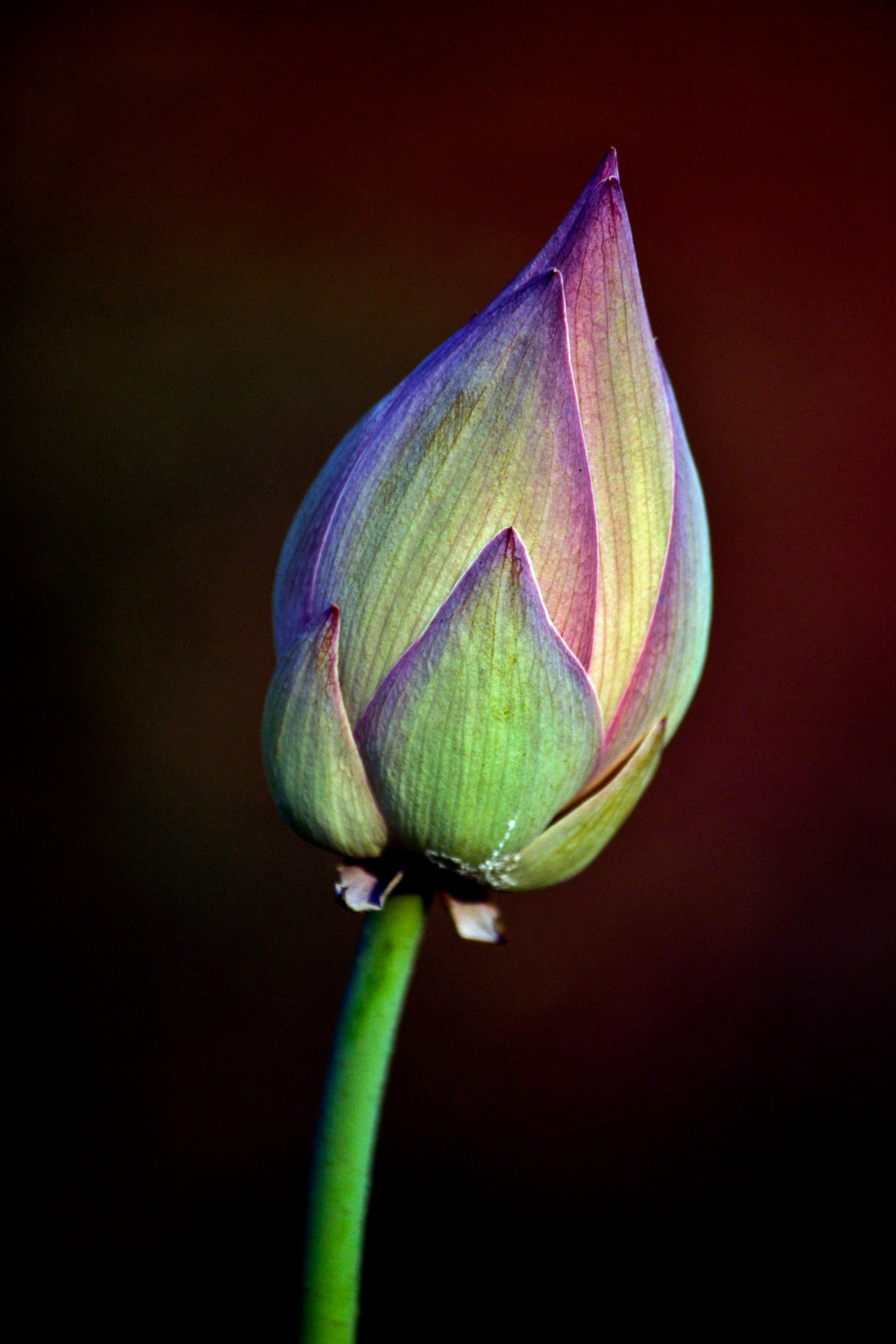 Nelumbo nucifera, known by a number of names including Indian lotus, sacred lotus, bean of India, or simply lotus, is a plant in the monotypic family Nelumbonaceae. The Linnaean binomial Nelumbo nucifera (Gaertn.) is the currently recognized name for this species, which has been classified under the former names, Nelumbium speciosum (Willd.) and Nymphaea nelumbo, among others. Names other than Nelumbo nucifera (Gaertn.) are obsolete synonyms and should not be used in current works. This plant is an aquatic perennial. Under favorable circumstances its seeds may remain viable for many years, with the oldest recorded lotus germination being from that of seeds 1,300 years old recovered from a dry lakebed in northeastern China.[1] A common misconception is referring to the lotus as a water lily (Nymphaea), an entirely different plant, as can be seen in the center of the flowers, which lack the structure that goes on to form the distinctive circular seed pod in the Nelumbo nucifera.[citation needed] Native to Tropical Asian nations and Queensland, Australia,[2][3] it is commonly cultivated in water gardens. It is also the national flower of India and Vietnam.